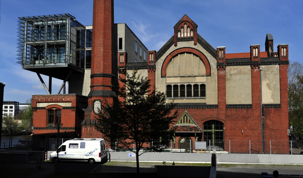 Berliner Abwasserentsorgung, Radialsystem V an der Spree, Holzmarktstrasse 33